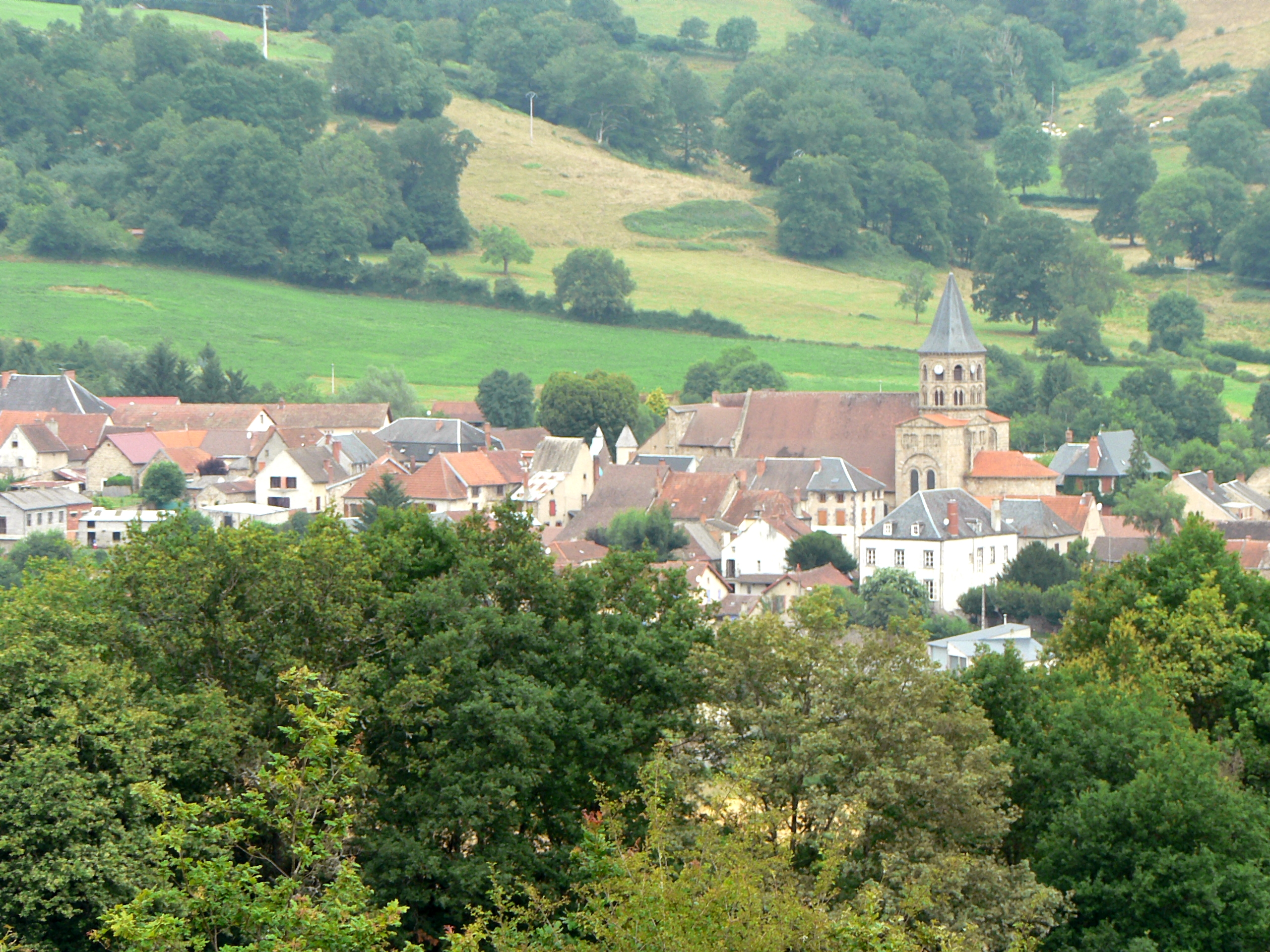 Village de Menat (Puy-de-Dôme, France).